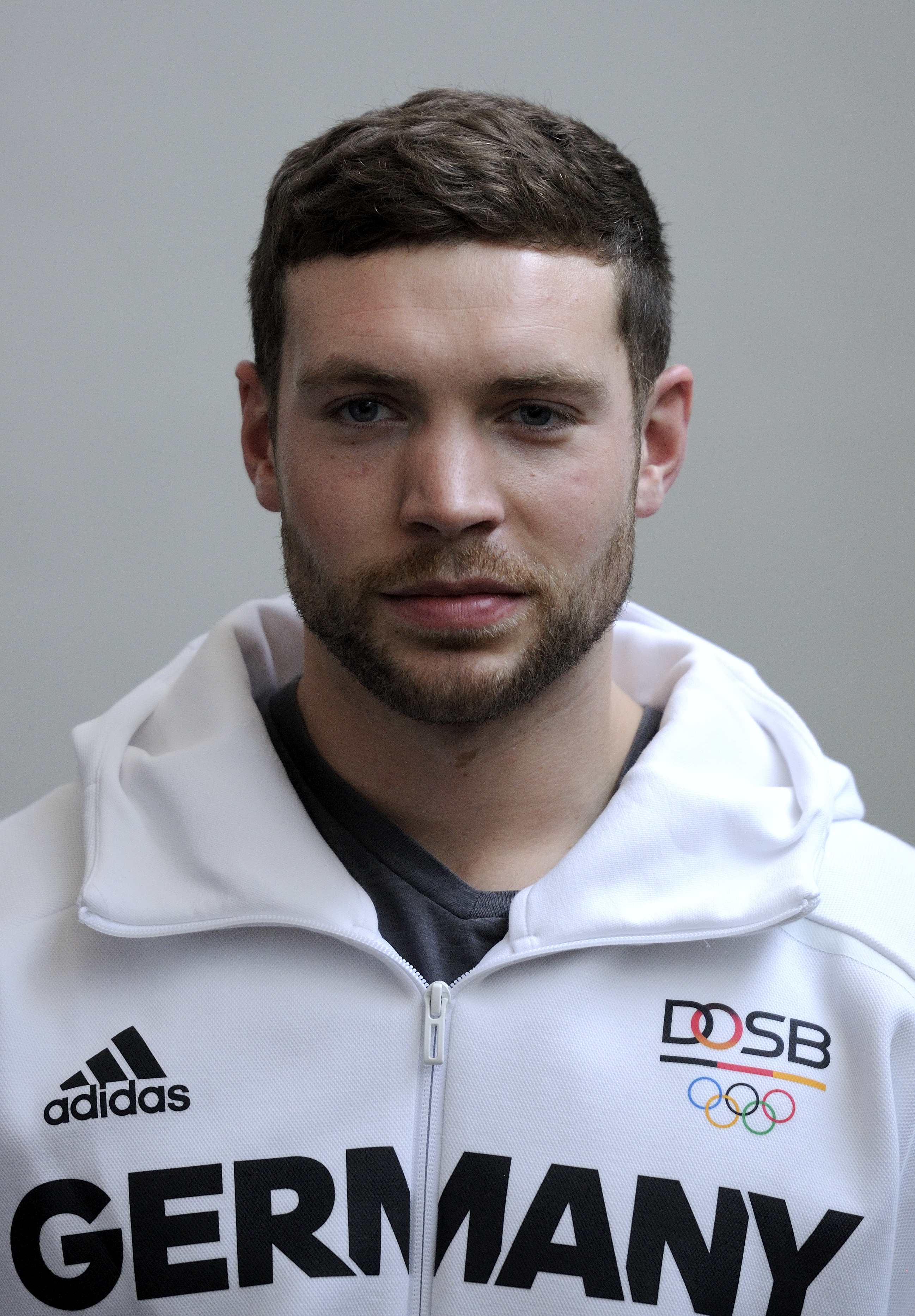 Bild aufgenommen in Hannover während der Einkleidung der deutschen Olympiamannschaft 2016. Michael Janker.